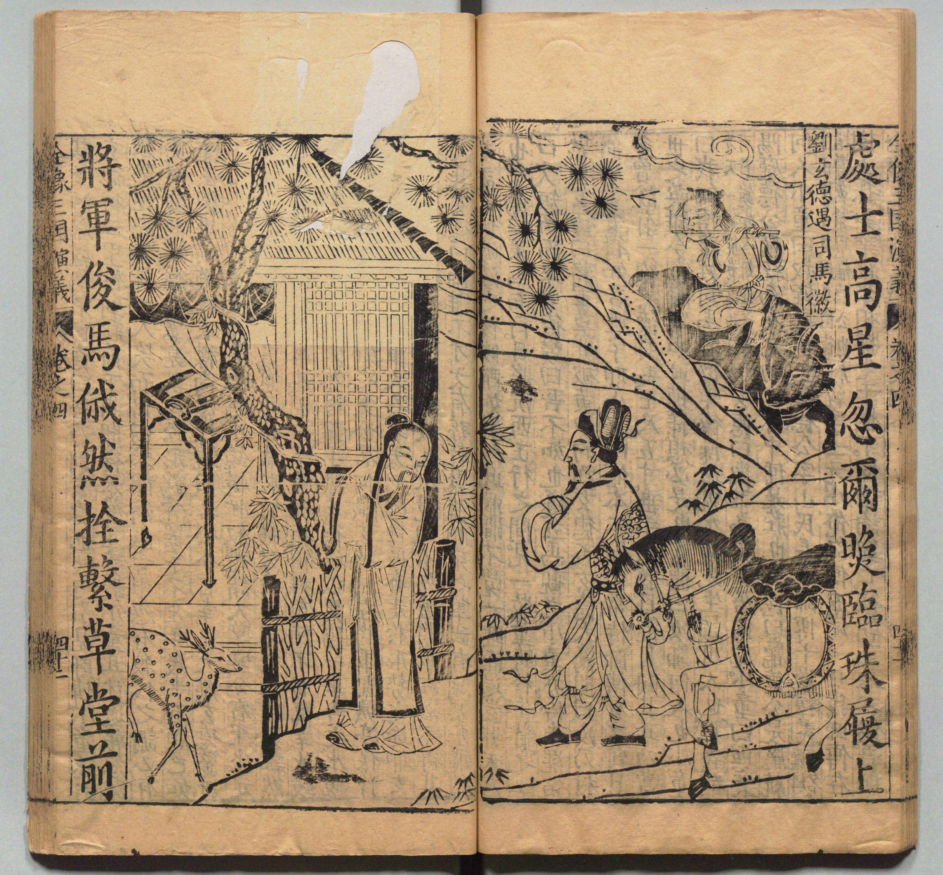 新刊校正古本大字音释三国志通俗演义 明万历十九年书林周曰校刊本